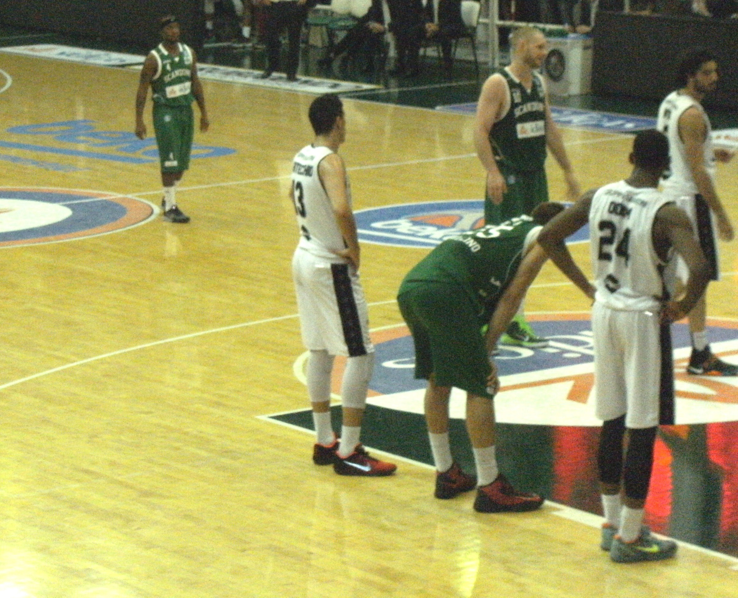 Fase di gioco dell'incontro Società Sportiva Felice Scandone - Virtus Pallacanestro Bologna del 20/03/2016 disputato presso il Palasport Giacomo Del Mauro di Avellino e terminato 82-74.